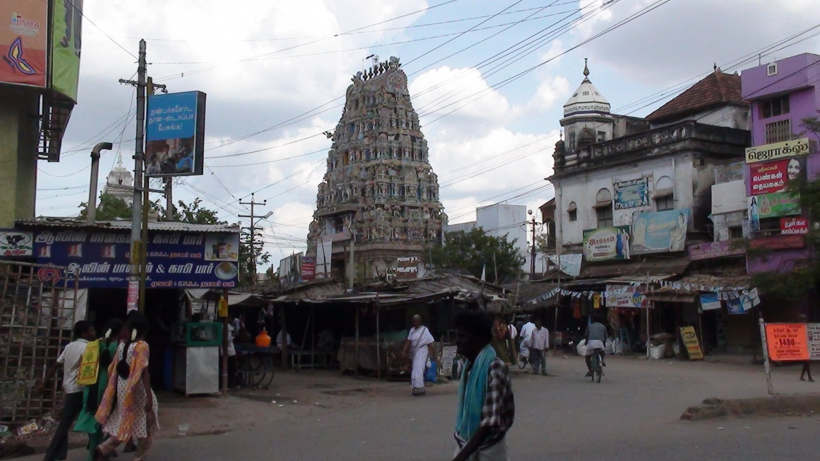 வரலாற்றுச் சிறப்பு மிக்க விருதுநகர் தெருக்காட்சி